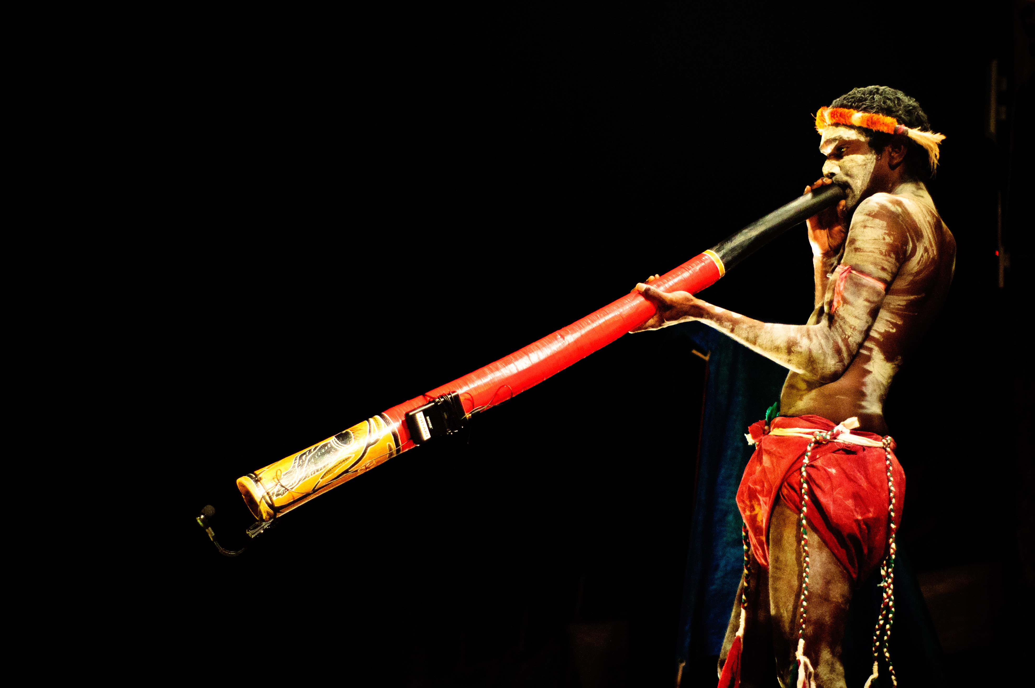 Didgeridoo